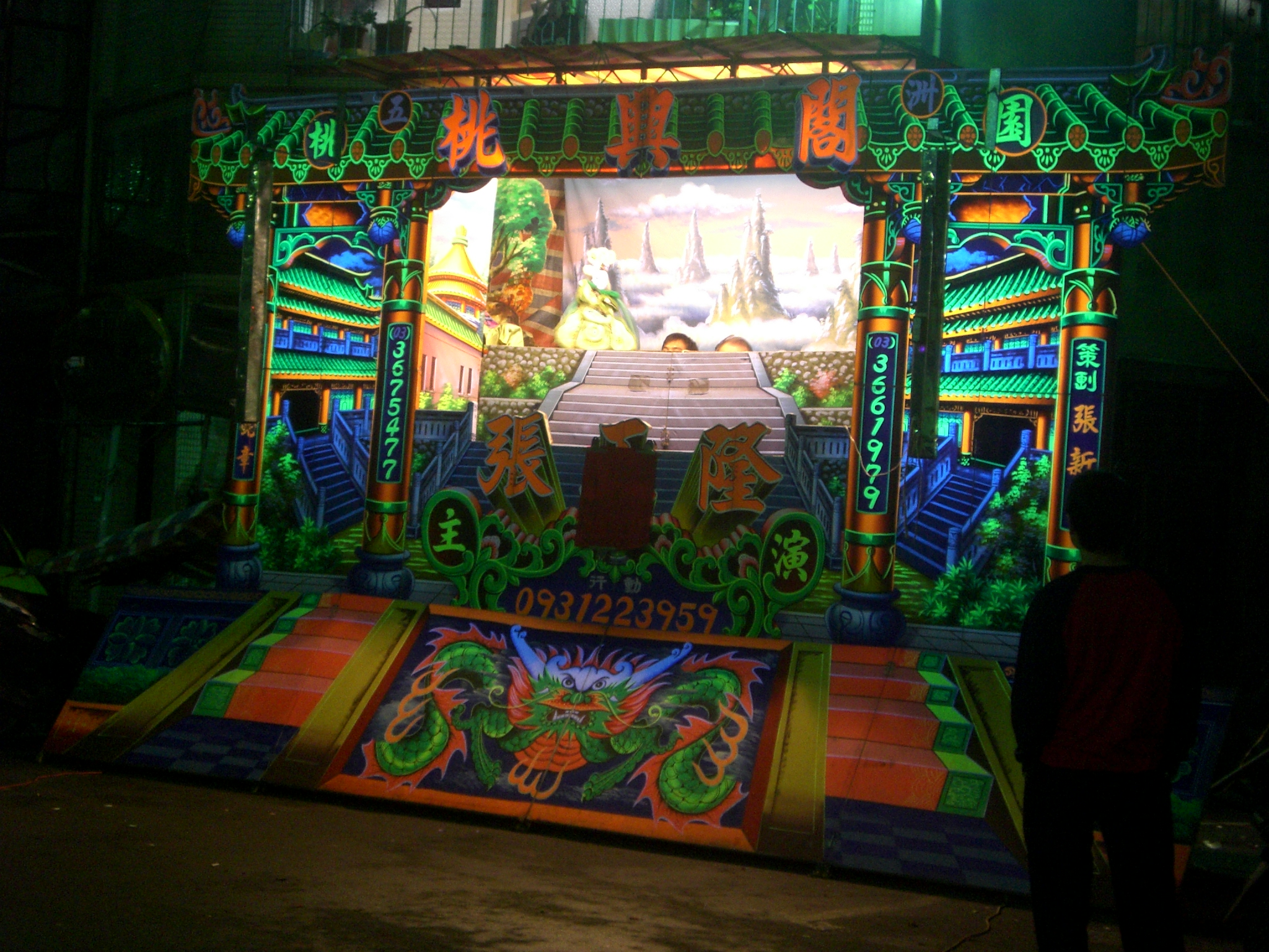 桃園桃興閣野台金光布袋戲台。